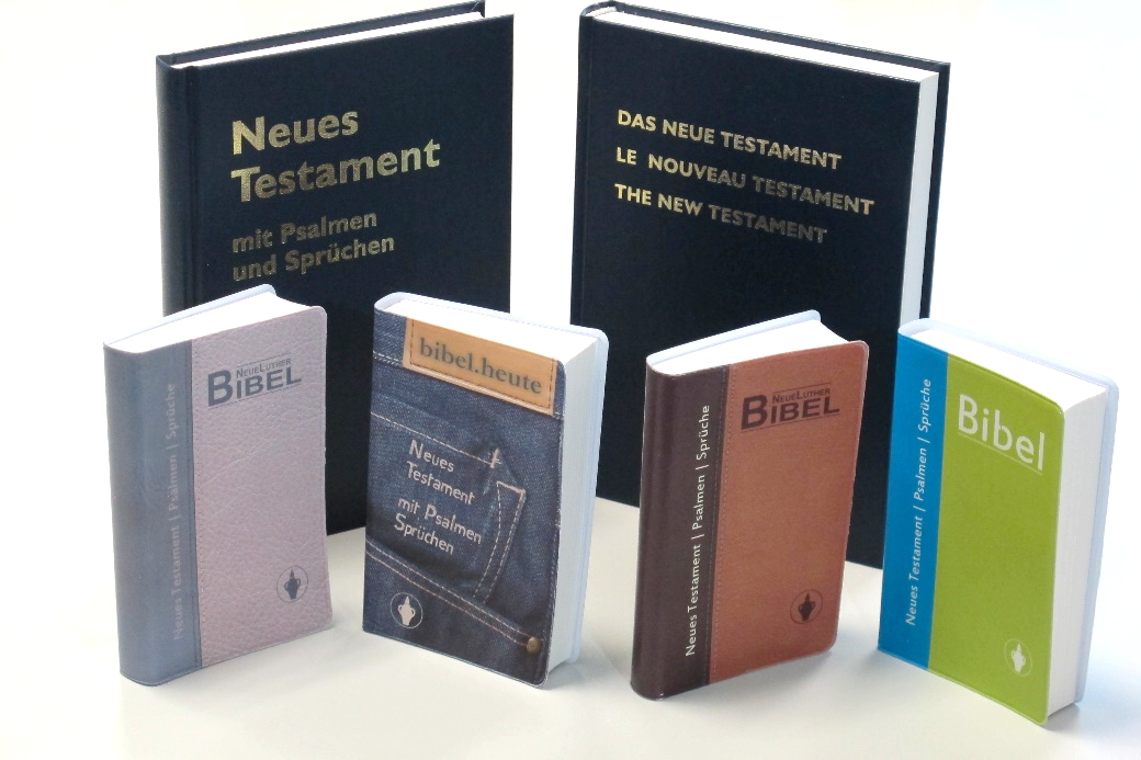 Verschiedene Bibelausgaben des Gideonbundes in Deutschland.